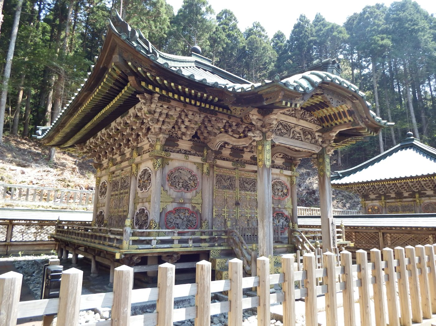 高野山 徳川御霊台 秀忠公